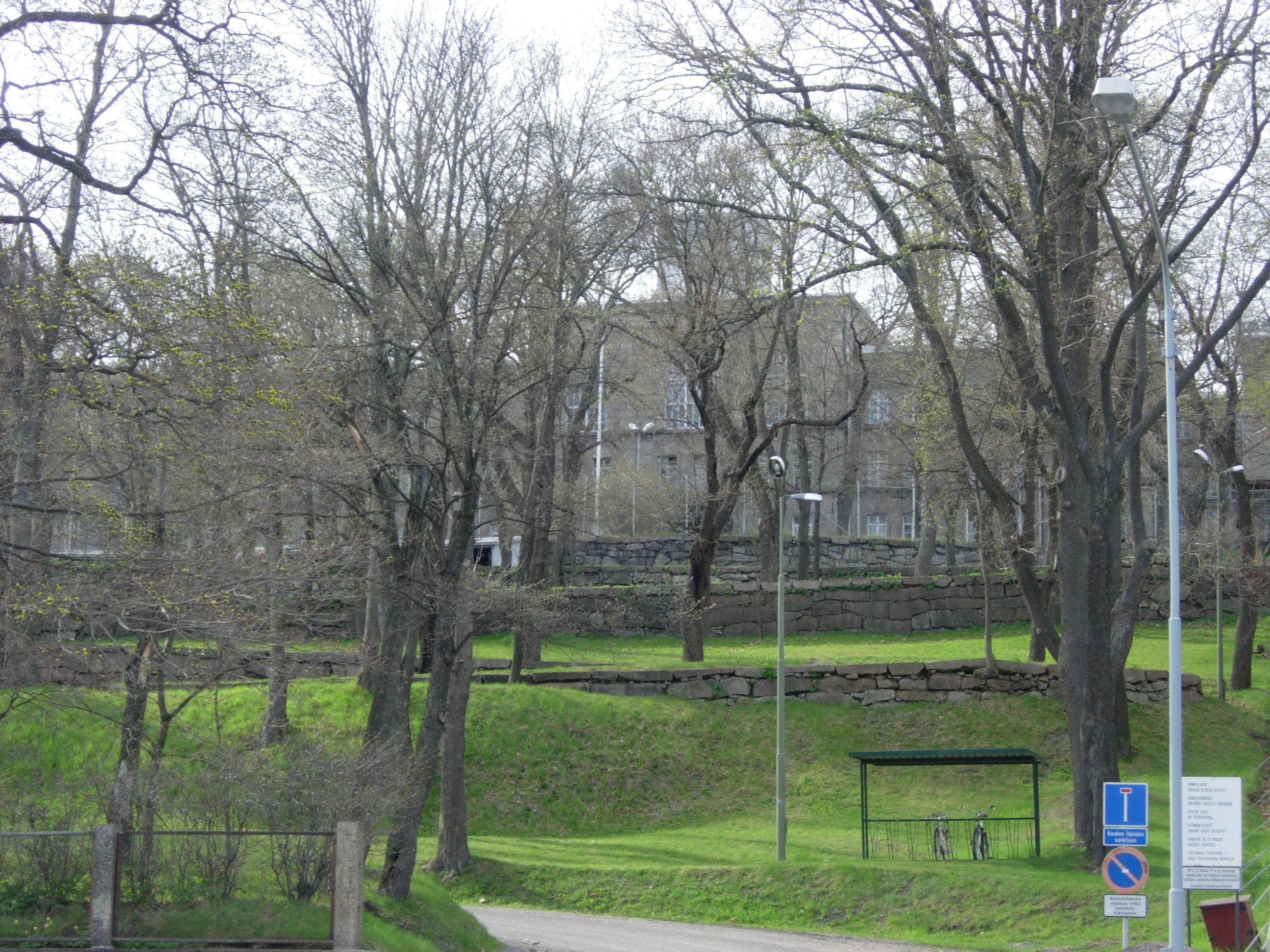 Kakola, eli Turun vankila, silloin kun se vielä oli vankila. Käynti Linnankadun puolelta.